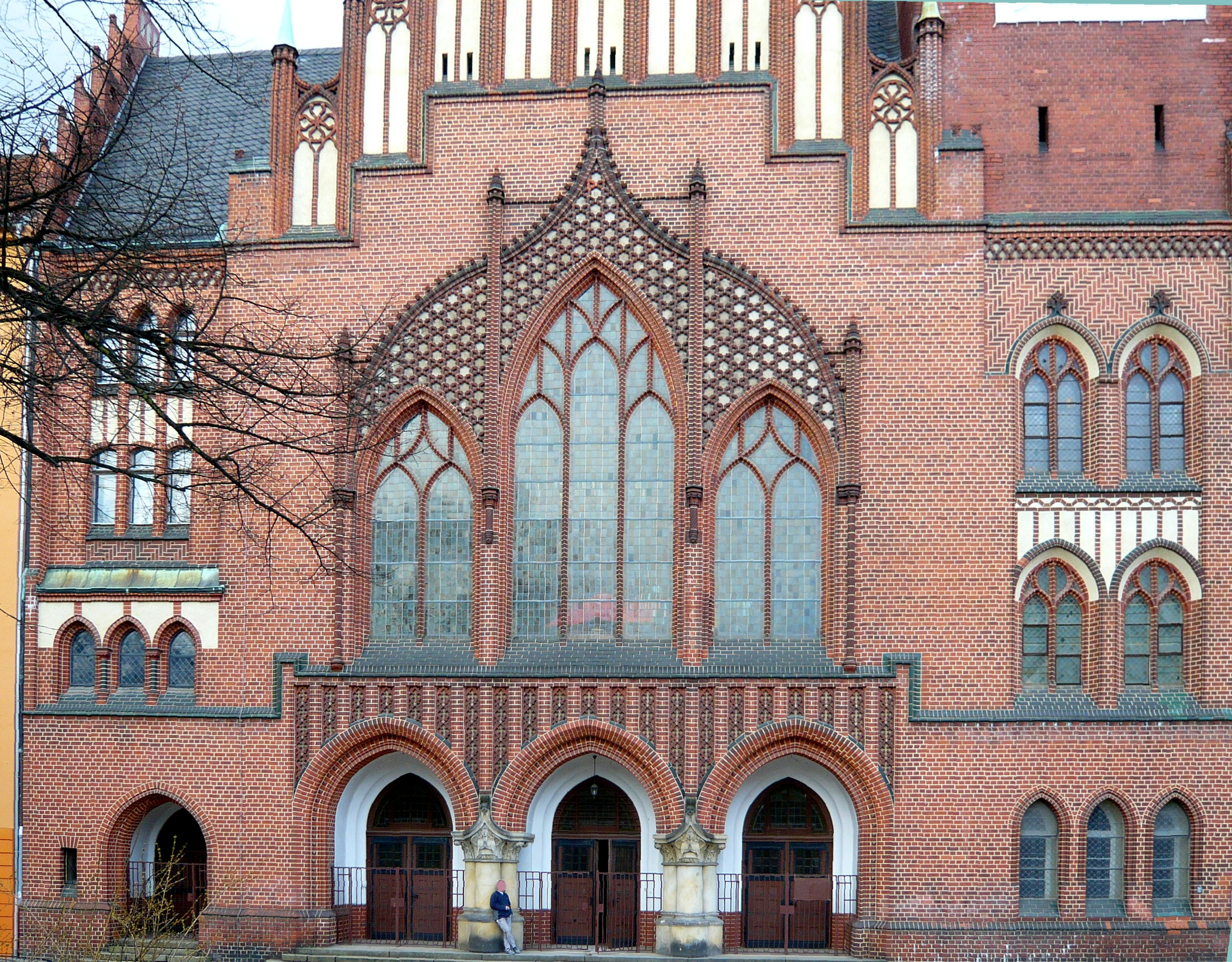 Ortsteil Friedrichshain: Pfingstkirche.